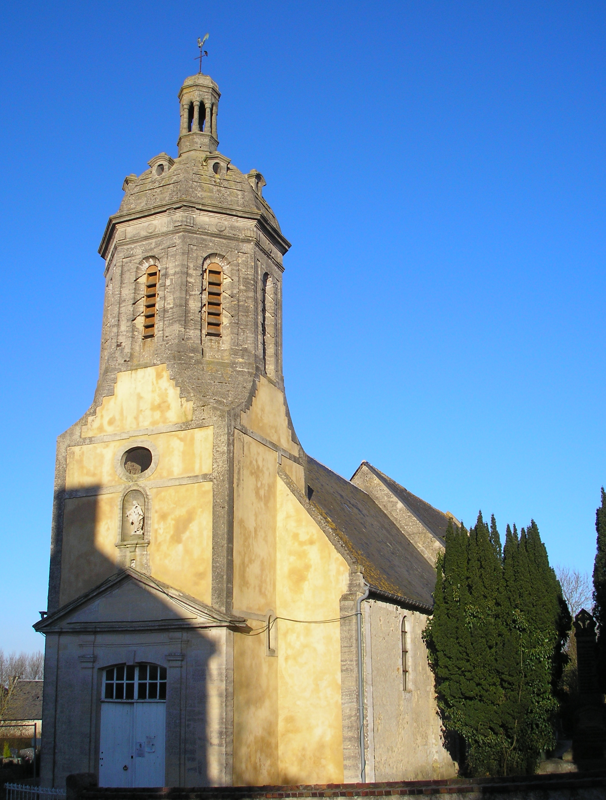 Condé-sur-Seulles (Normandie, France). L'église Notre-Dame.